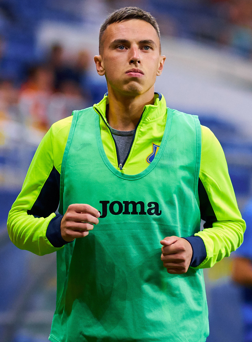 Разгром по-ростовски. Карпин против Аленичева